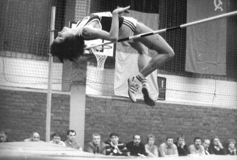 Susanne Beyer-Helm ADN-ZB Ludwig-21.1.87 Bez. Erfurt: Hochsprung mit Musik. Eine neue DDR-Hallenbestleistung im Hochsprung der Frauen gab es beim traditionellen Hochsprung mit Musik in Arnstadt. Die Berlinerin Susanne Beyer-Helm übersprang als erste DDR-Athletin die 2.00 Meter und verbesserte damit die fünf Jahre alte Bestmarke von Andrea Bienias um einen Zentimeter. Die 25jährige Susanne Beyer-Helm ist die dritte Hochspringerin der Welt, die in der Halle die Zwei-Meter-Marke übersprang.